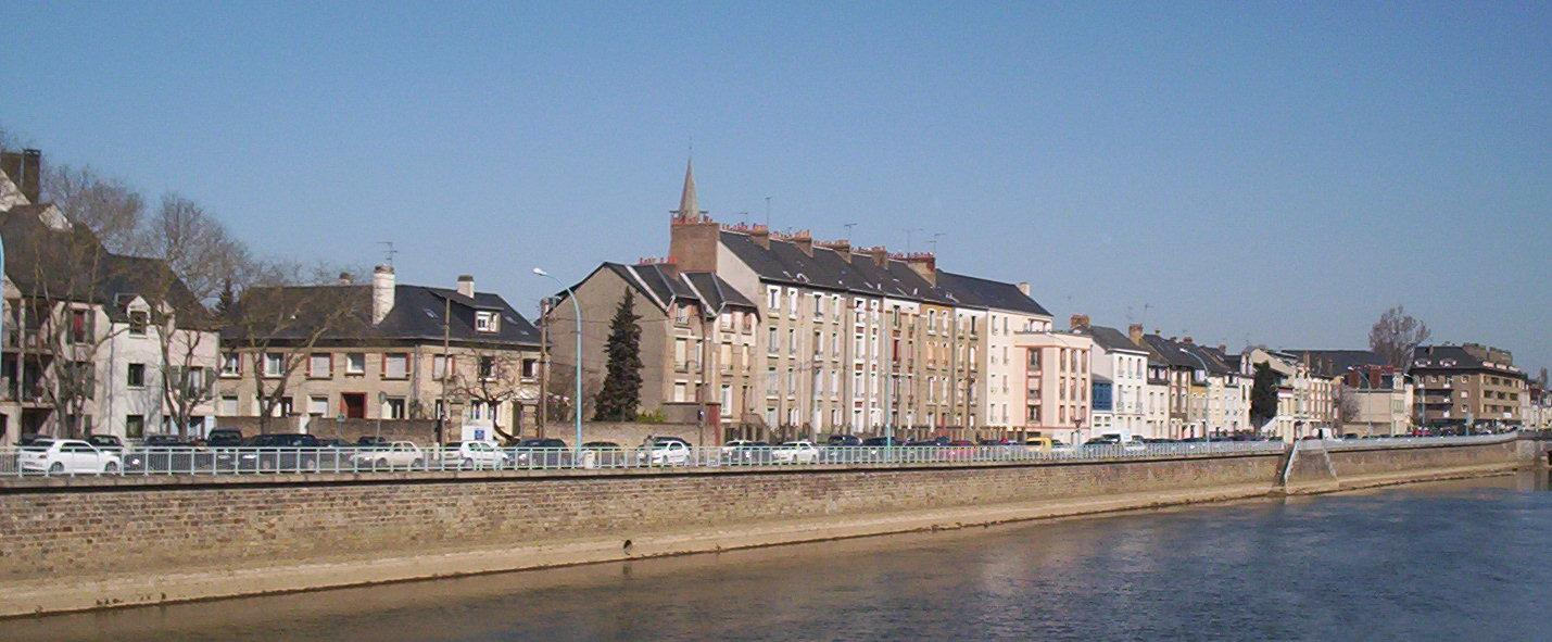 Le quartier du Pré vue depuis le Pont Gambetta